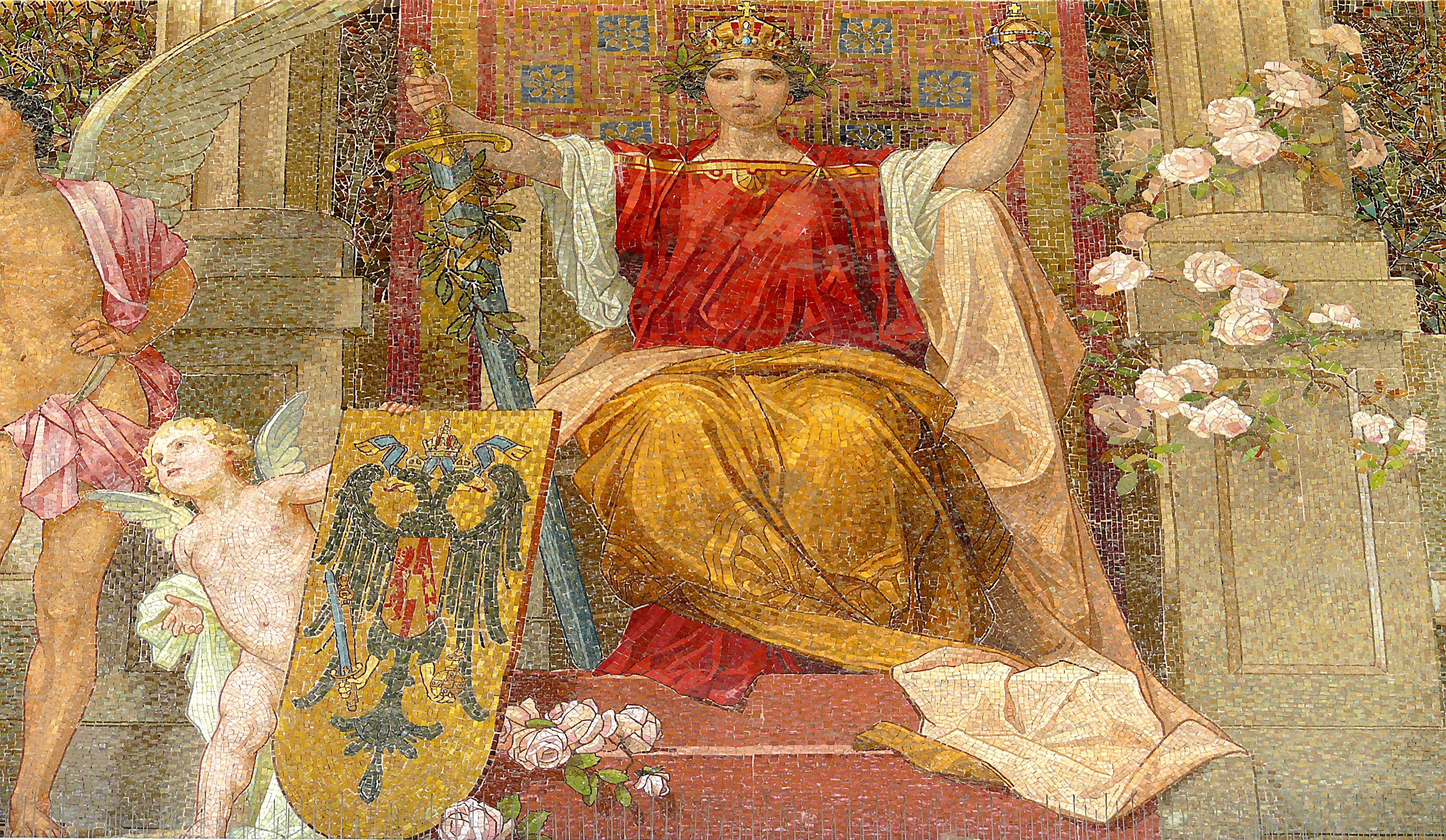 Parlament austria mosaik